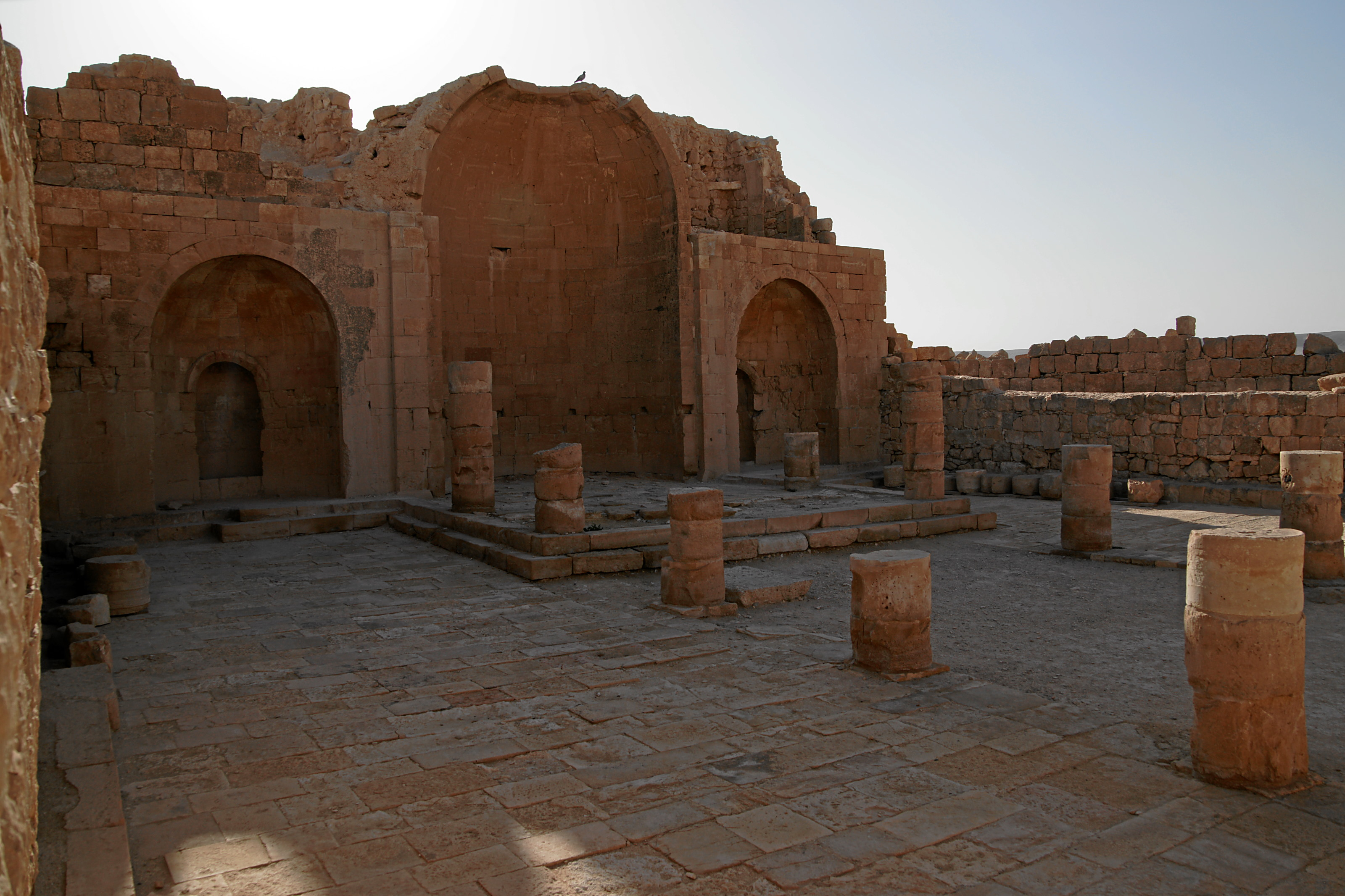 Shivta: Southern Church